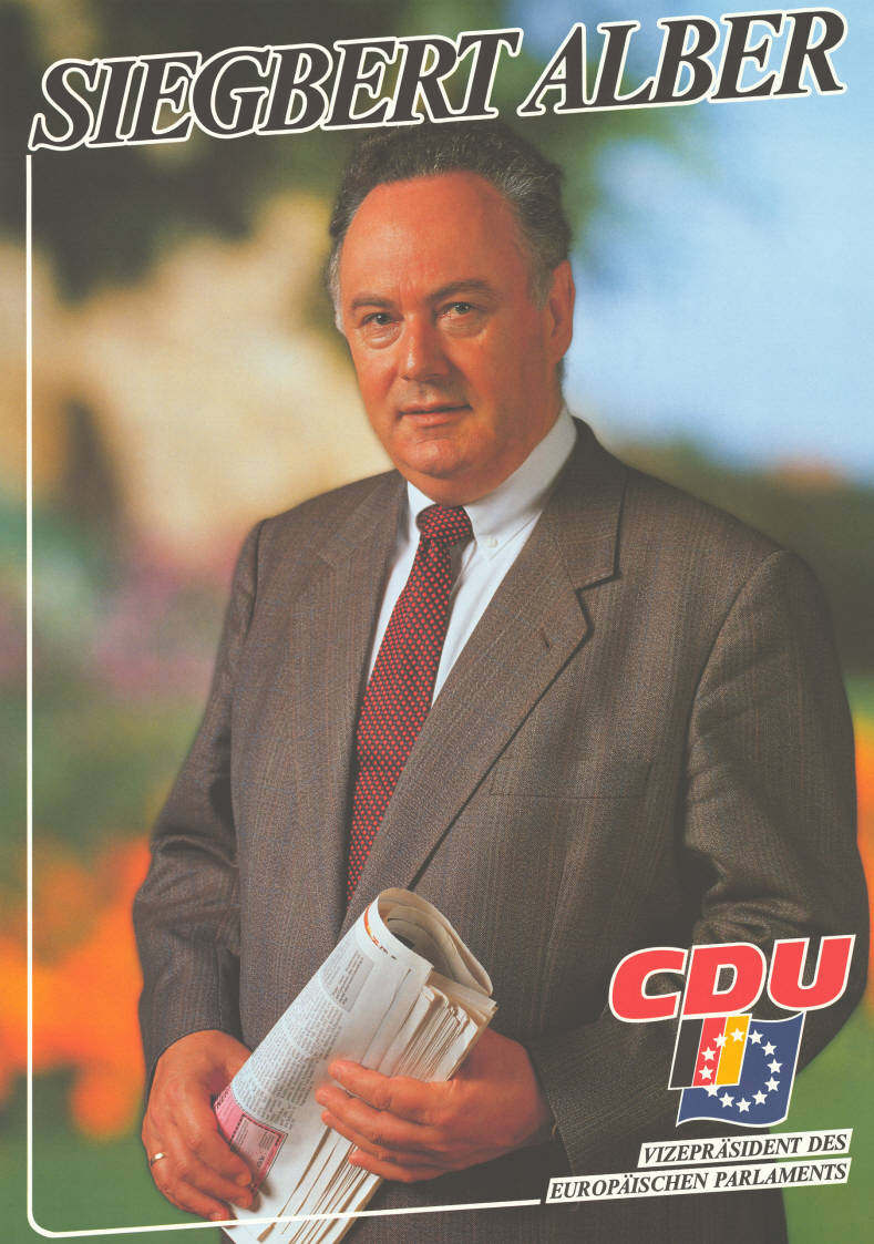 Siegbert Alber CDU Vizepräsident des Europäischen Parlaments Abbildung: Foto Plakatart: Kandidaten-/Personenplakat mit Porträt Objekt-Signatur: 10-030 : 216 Bestand: Europawahlplakate (10-030) GliederungBestand10-18: Europawahlplakate (10-030) » CDU Lizenz: KAS/ACDP 10-030 : 216 CC-BY-SA 3.0 DE